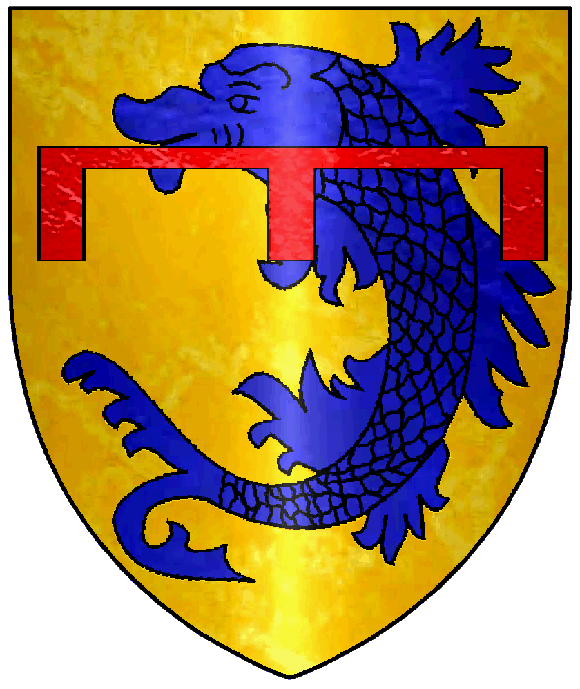 Blason de Guichard Ier Dauphin